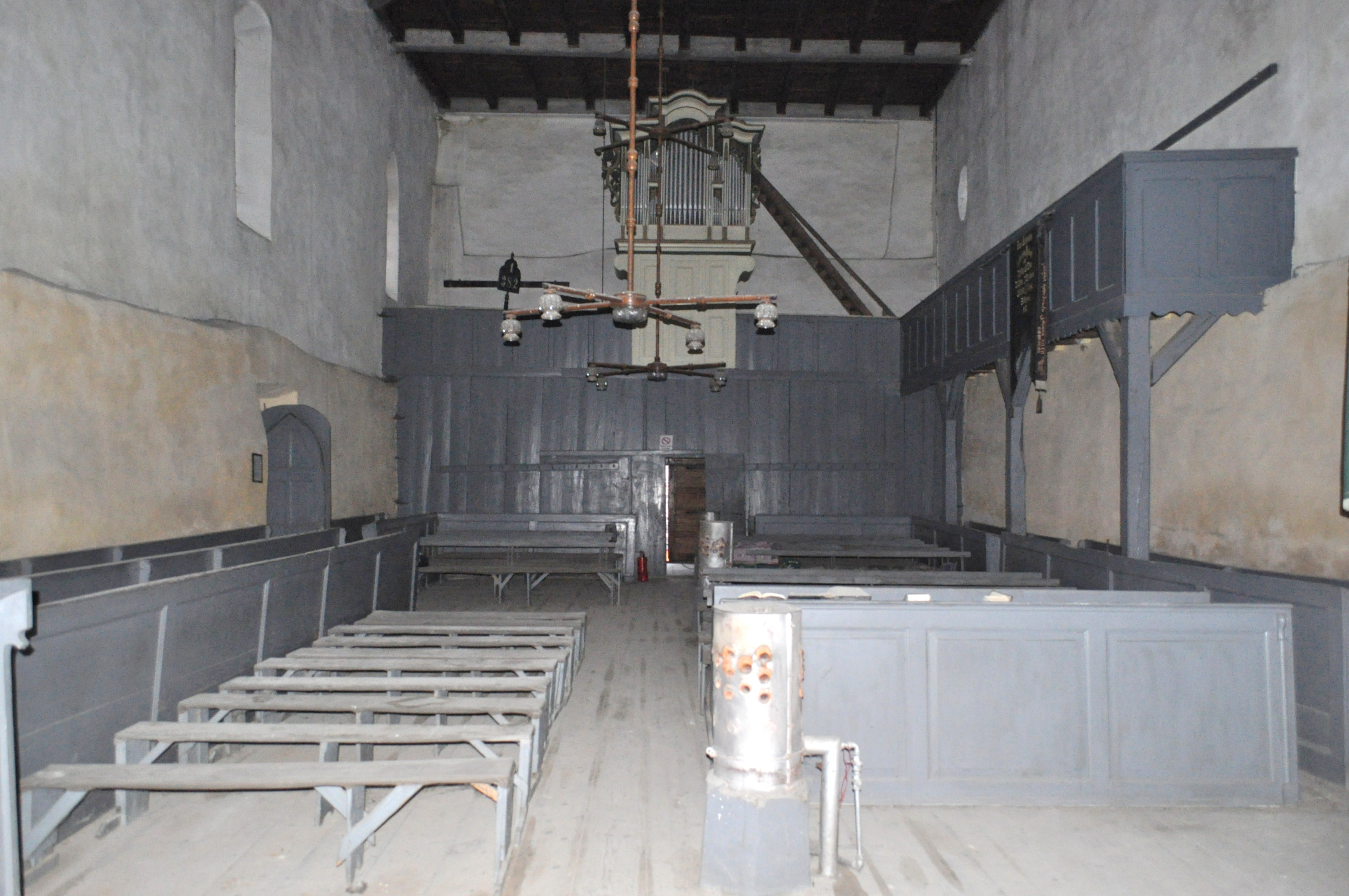 Biserica evanghelică, sat DÂRLOS; comuna DÂRLOS, județul Sibiu